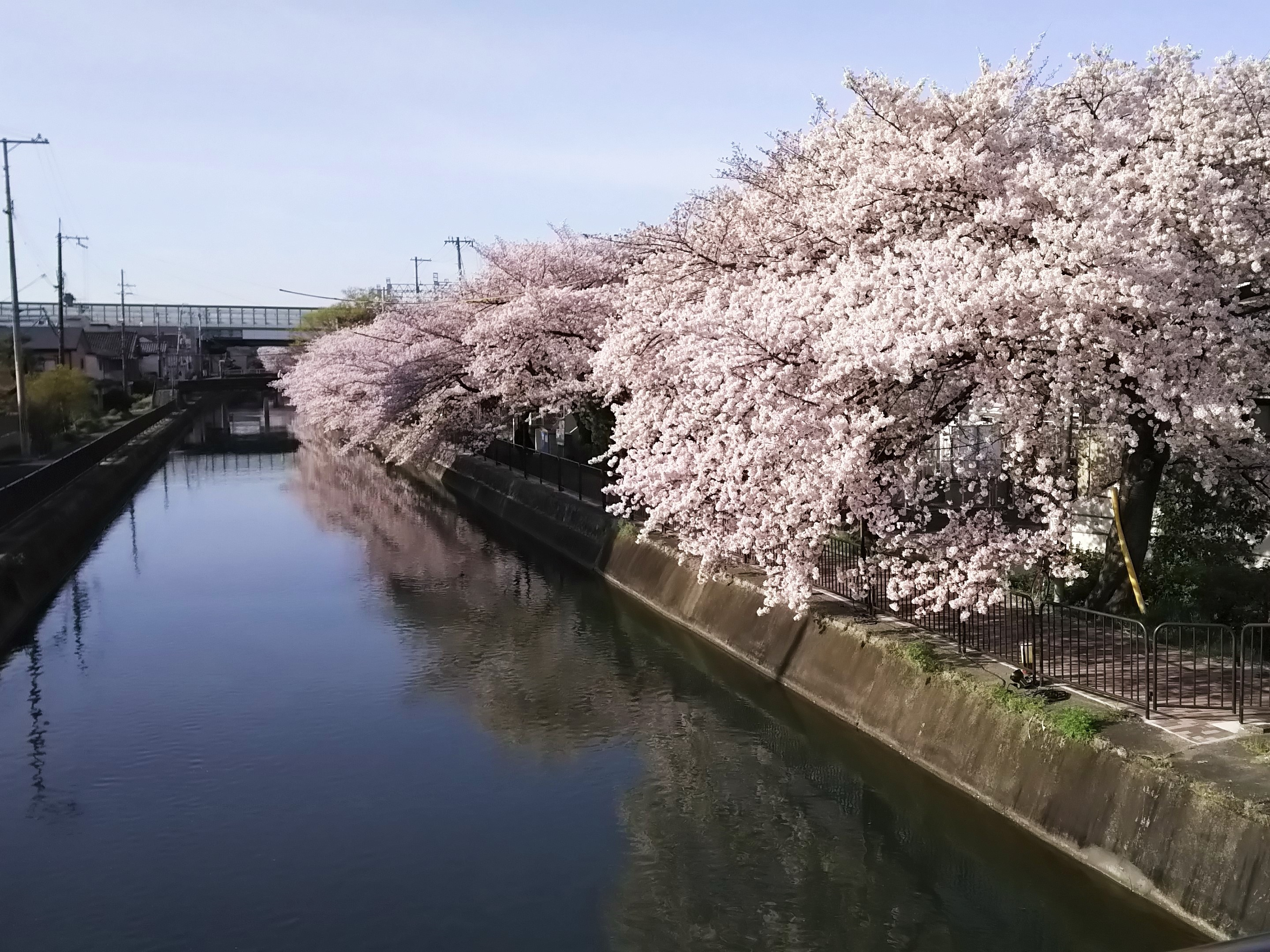 琵琶湖疏水、師団橋より南を望む（京都市伏見区）